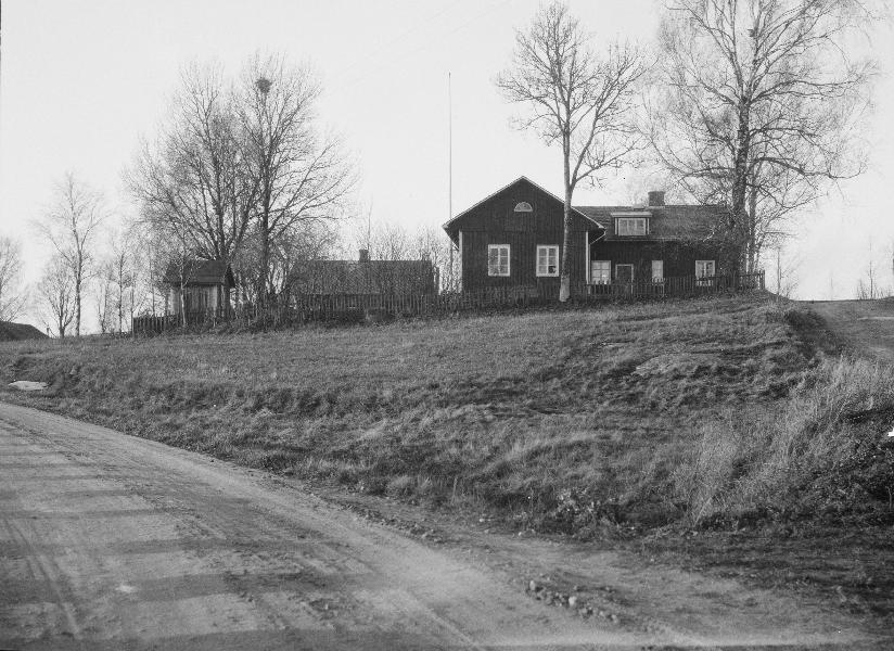 Gamla kyrkogården, vid fototillfället och fram till 1972 skolgård. Kategori: (01) ExteriörerGamla kyrkogården, vid fototillfället och fram till 1972 skolgård.